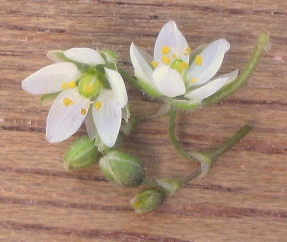 (nl: Gewone spurrie bloem) Spergula arvensis